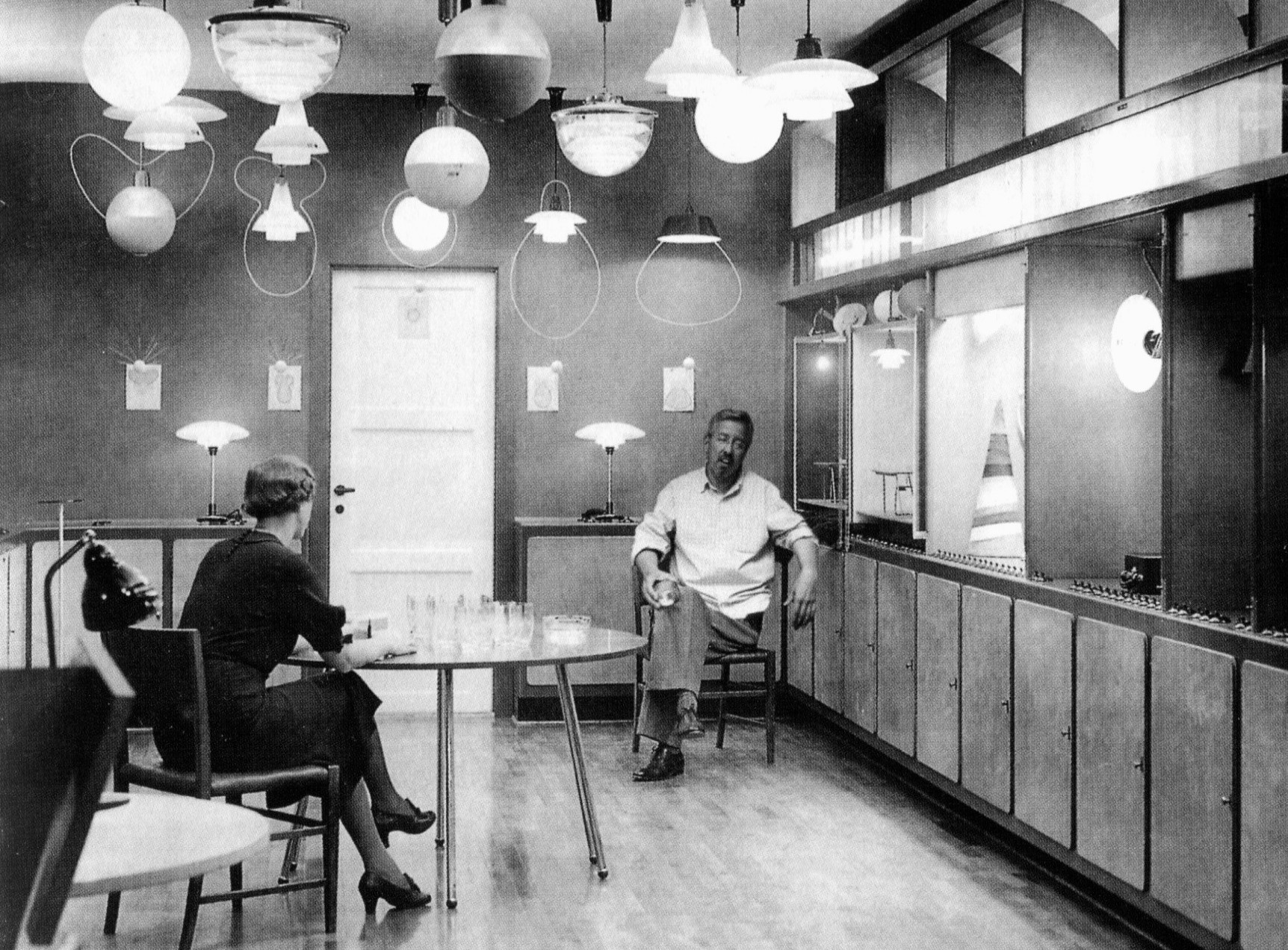 Louis Poulsens visningsrum i Nyhavn, till höger sitter Poul Henningesen som utformade rummet.